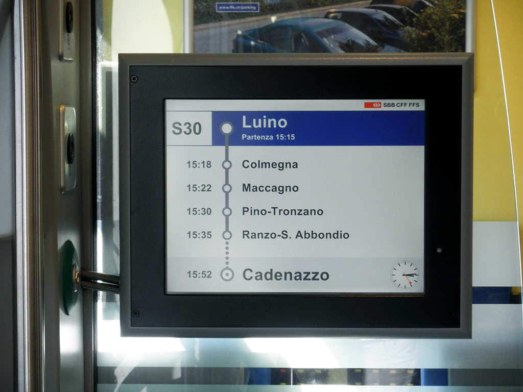 Indicatore delle fermate successive su un elettrotreno RABe 524 della società TILO